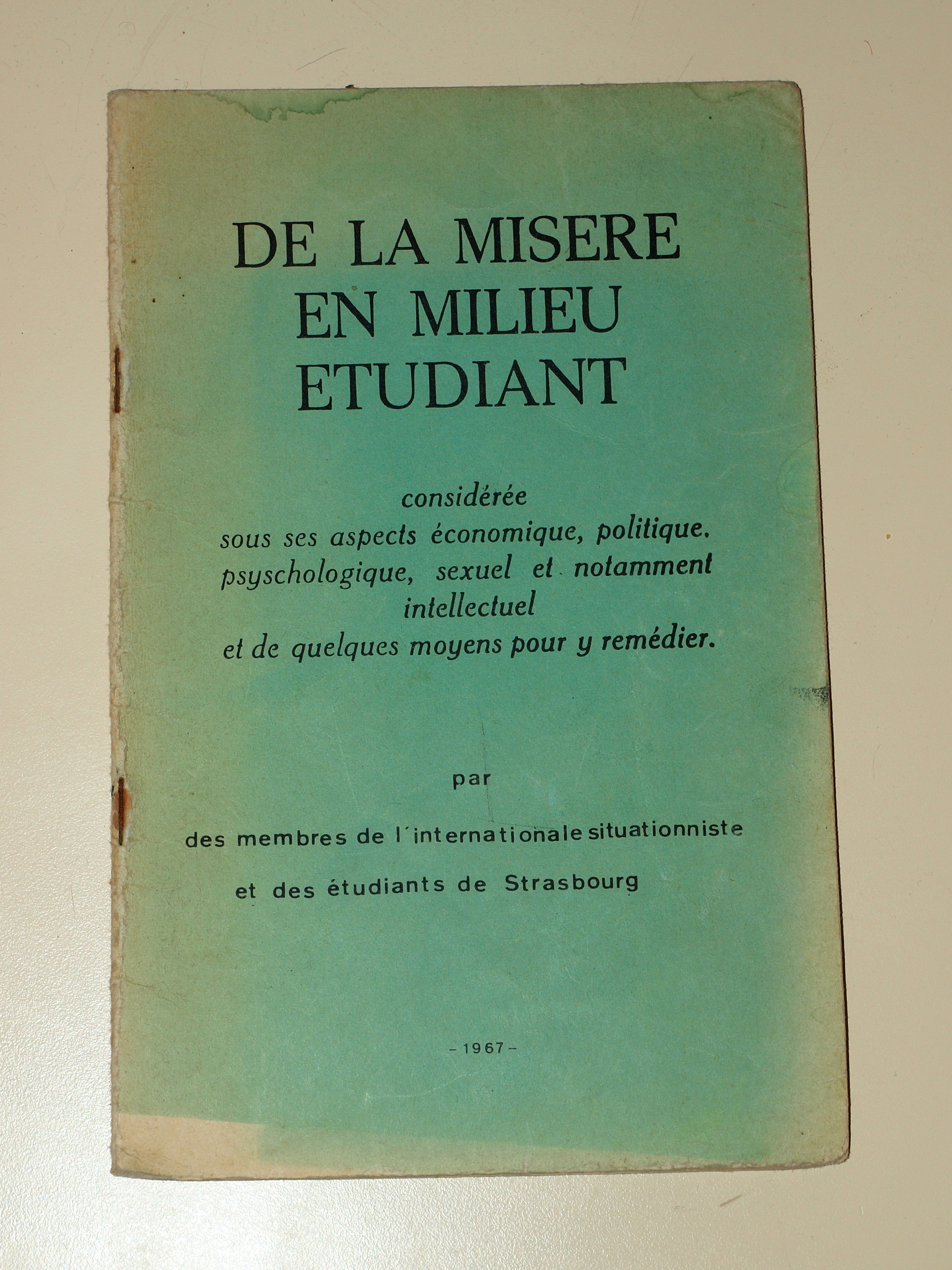 Exposition Mai 68 et la suite..., à Villeneuve-la-Guyard (Yonne, France) , du 22 au 29 mai 2018